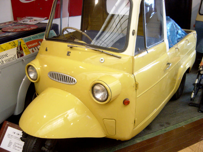 MITSUBISHI-Leo(三菱自動車),Fukuyama MOTOR and CLOCK MUSEUM